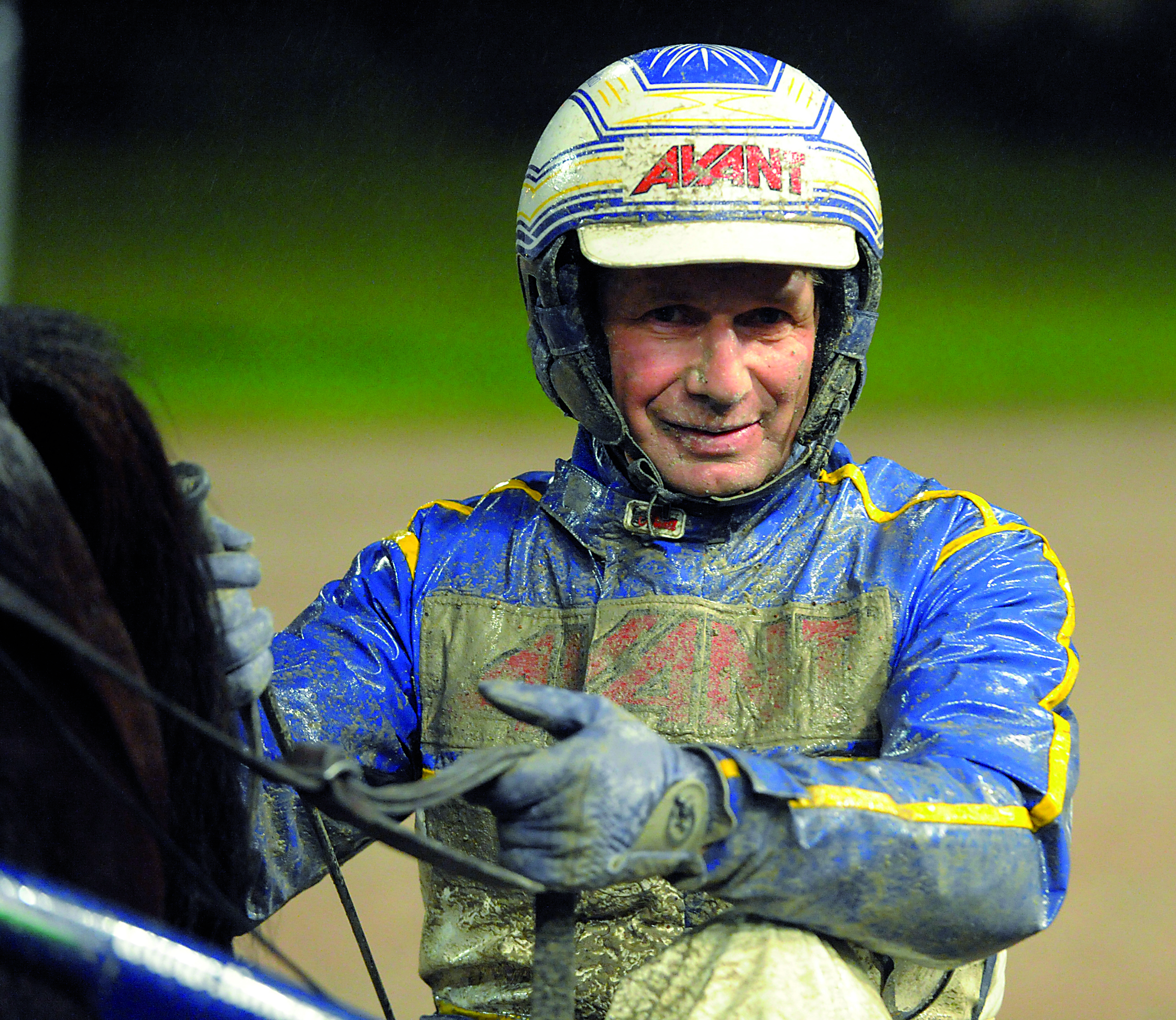 Den finska kusken Jorma Kontio på Örebrotravet.